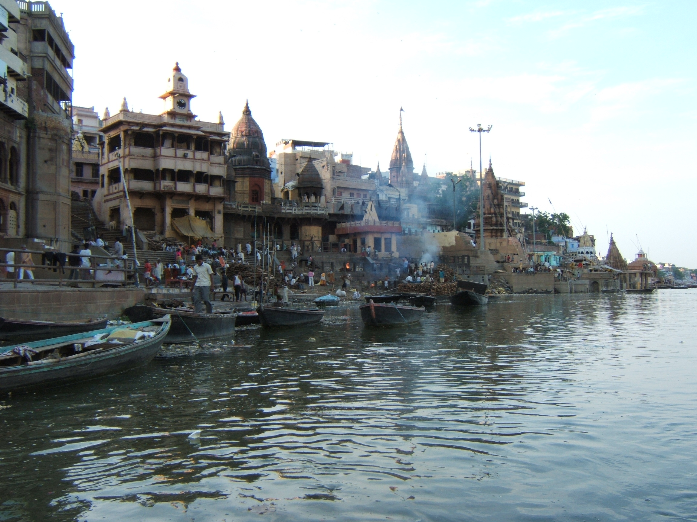 Varanasi burning ghat